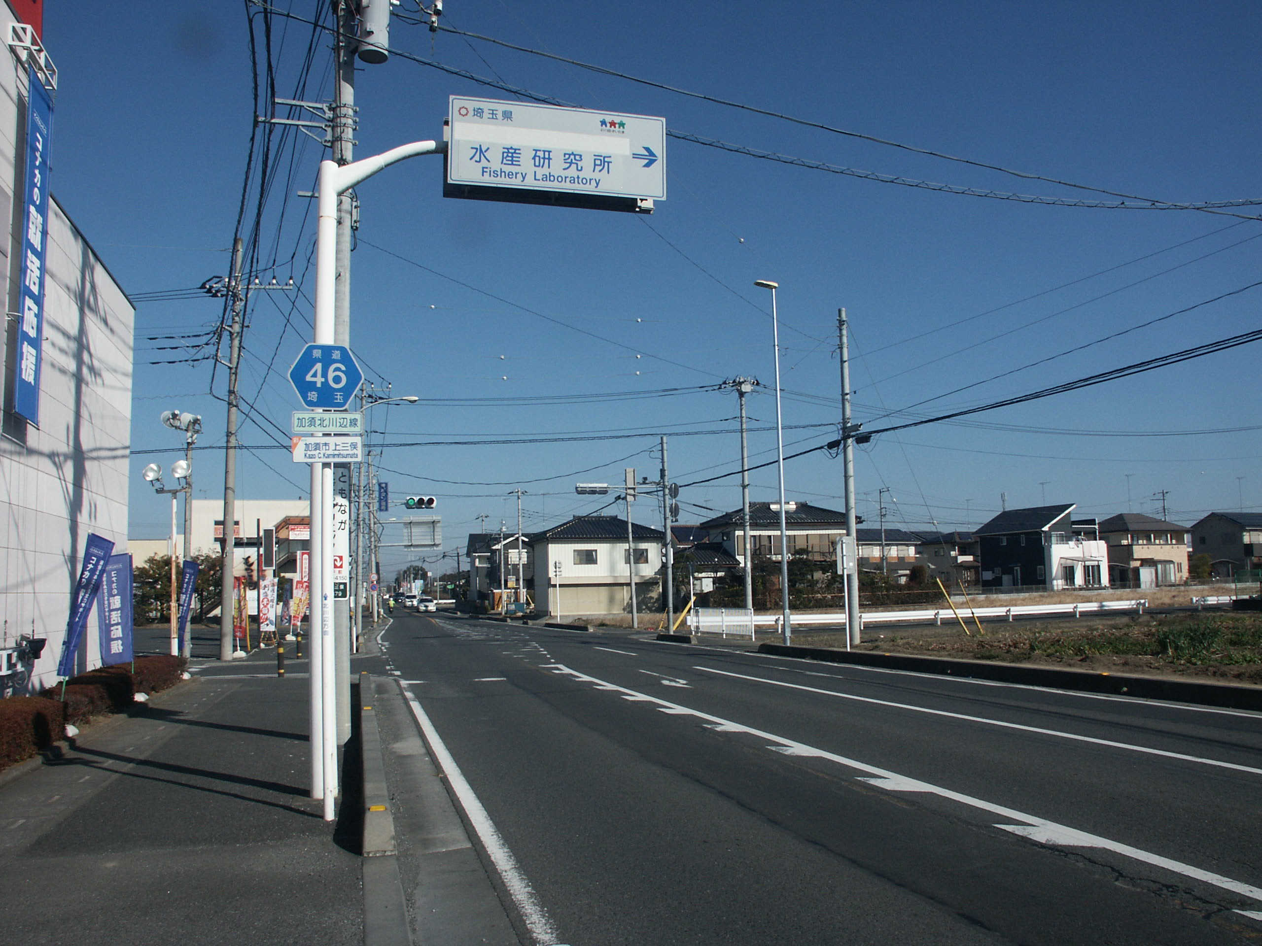 埼玉県道46号線加須市上三俣付近